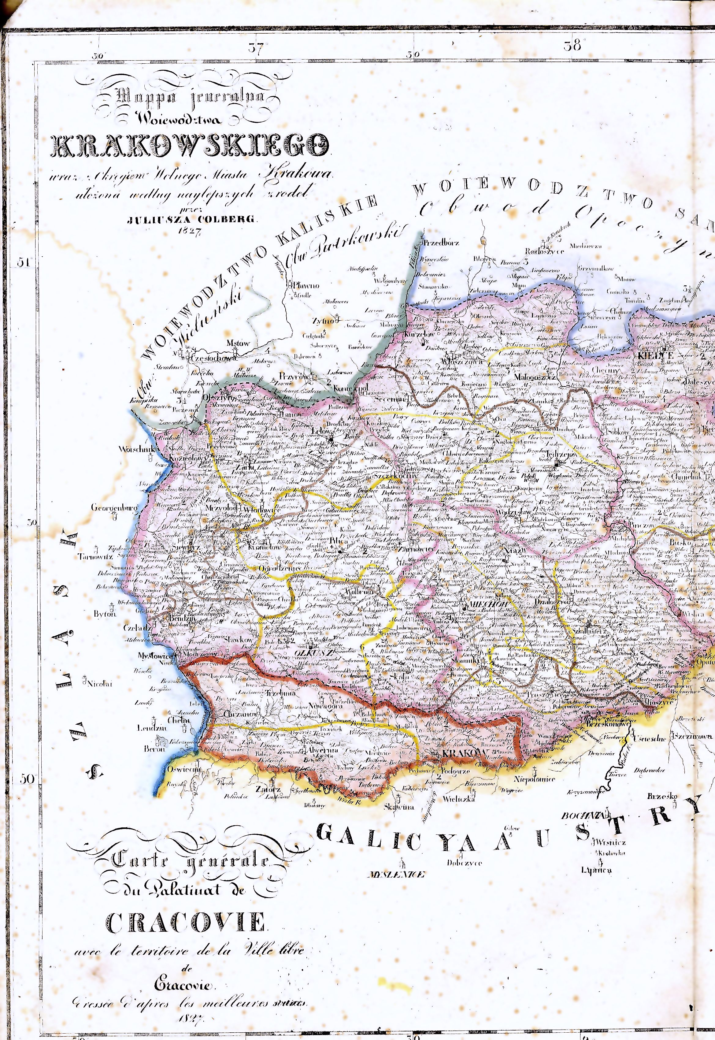 Kraków voivodship in 1827